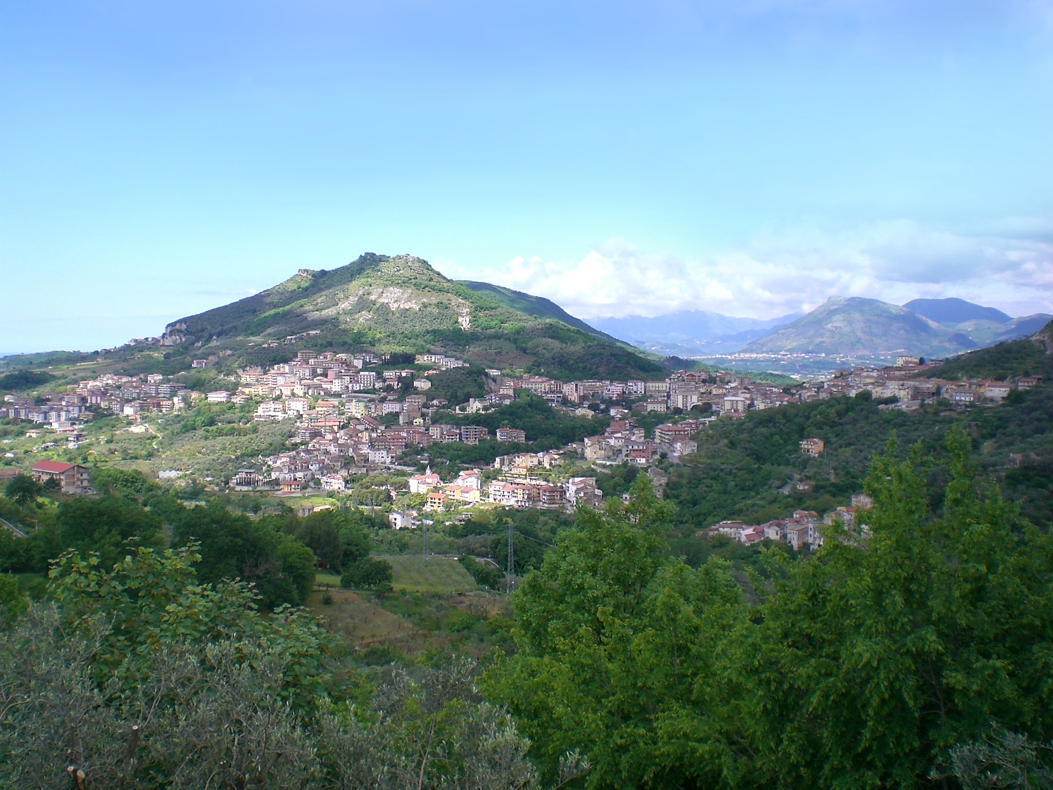 Veduta di Montecorvino Rovella